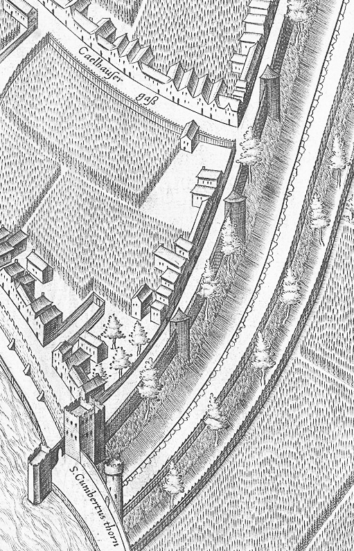 Ausschnitt des Mercator – Stadtplanes Köln. Bereich „Kahlenhausen um_1571“